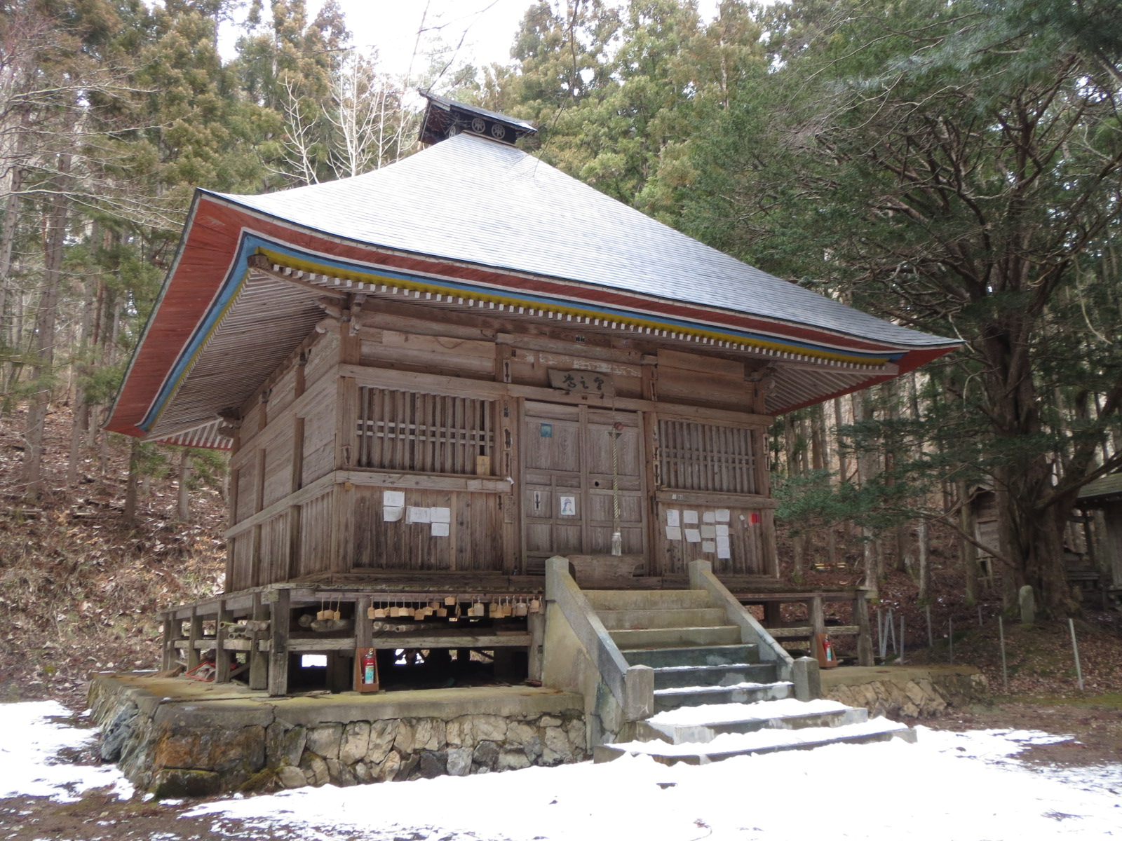 遠野市にある山谷観音堂 Canon IXY 3